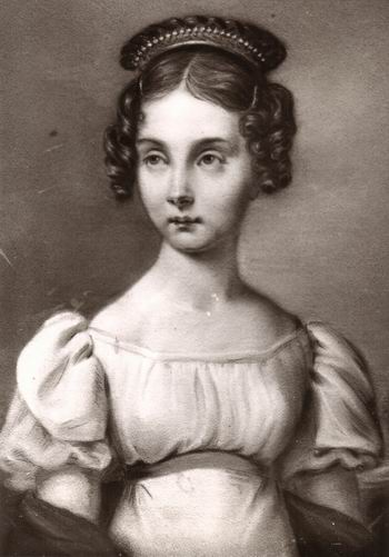 Charlotte von Preußen, Frau von Georg II.